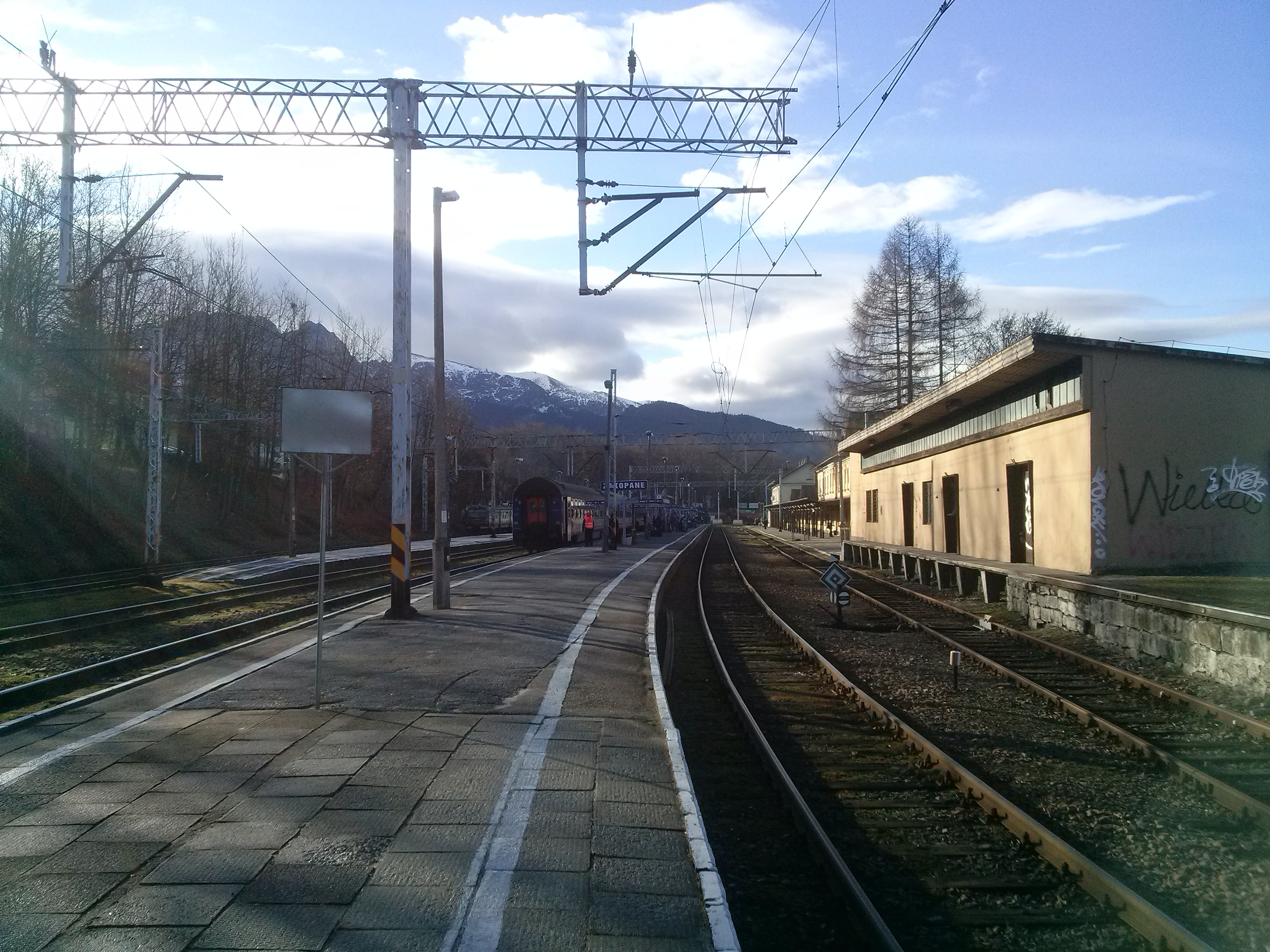 Widok na stację w Zakopanem od strony Poronina, na lewo stoi TLK WENUS, którym przyjechałem